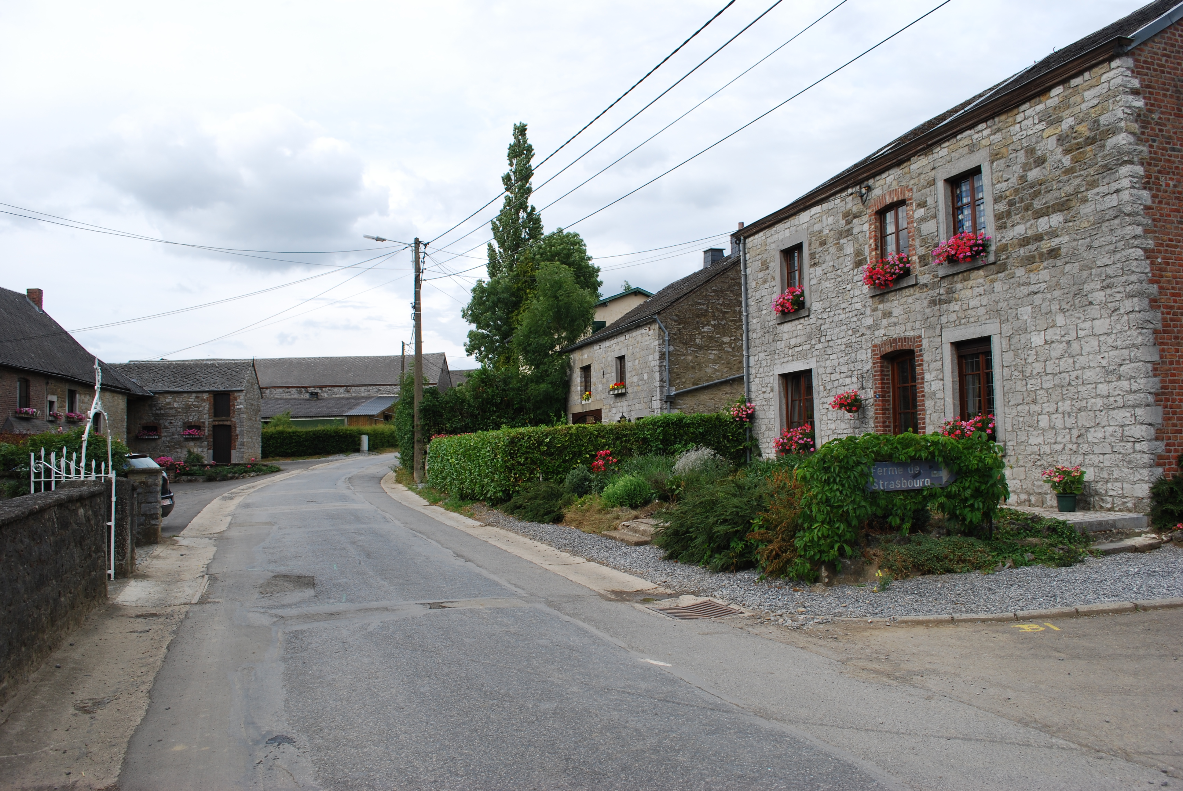 Vue d'Ozo (Durbuy).